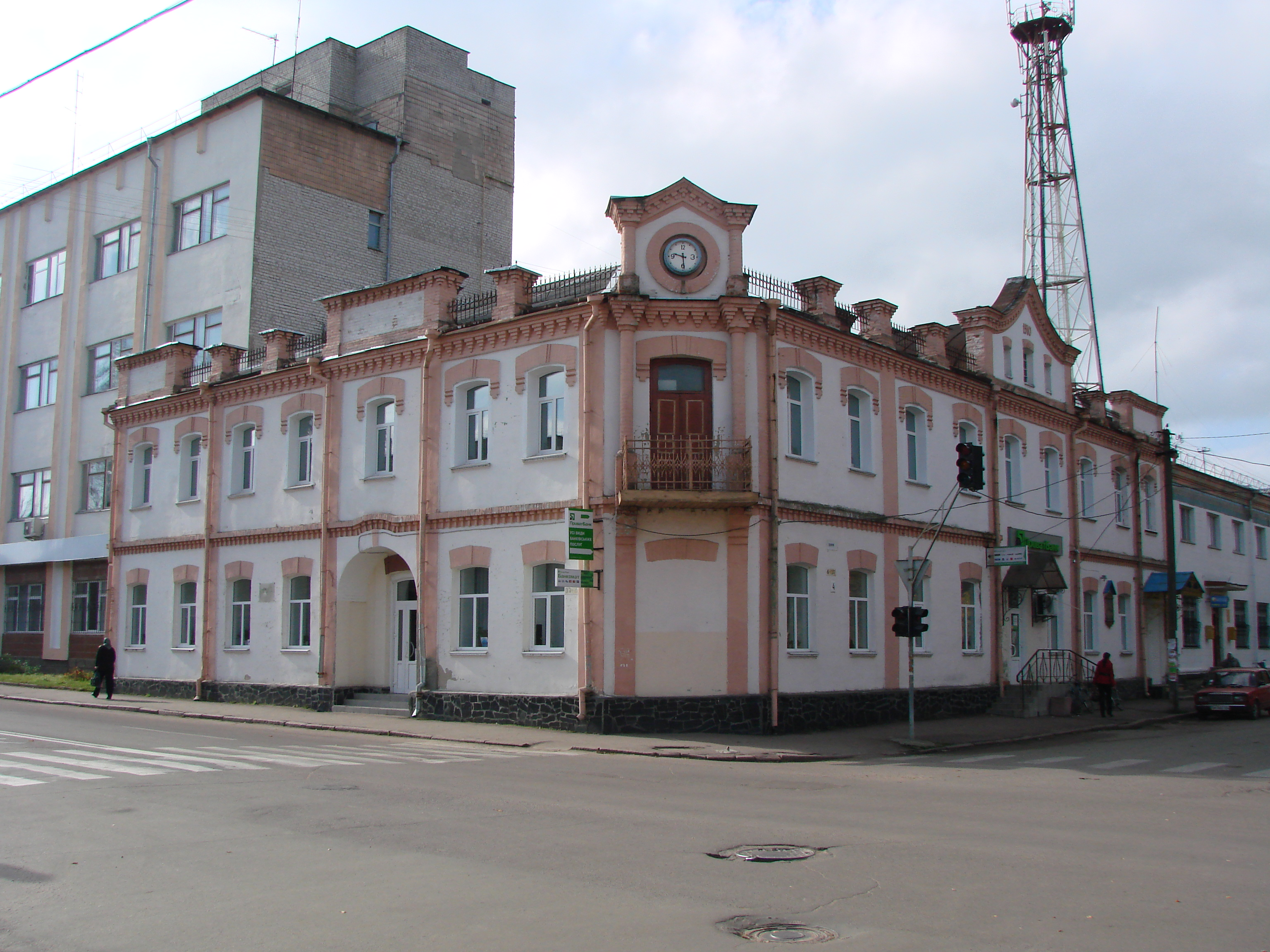 Купецький особняк, Овруч, вул. Радянська, 37-4